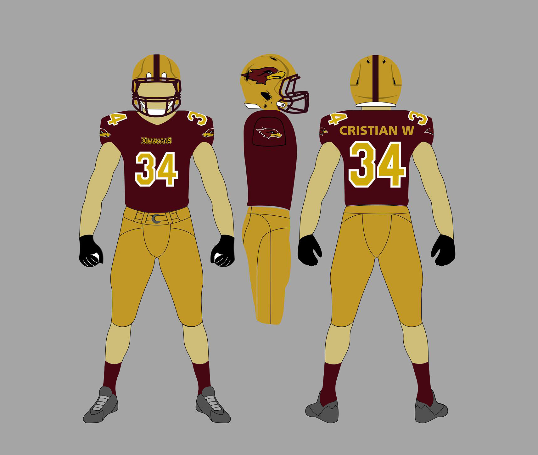 Uniforme do Carlos Barbosa Ximangos 2016/2017